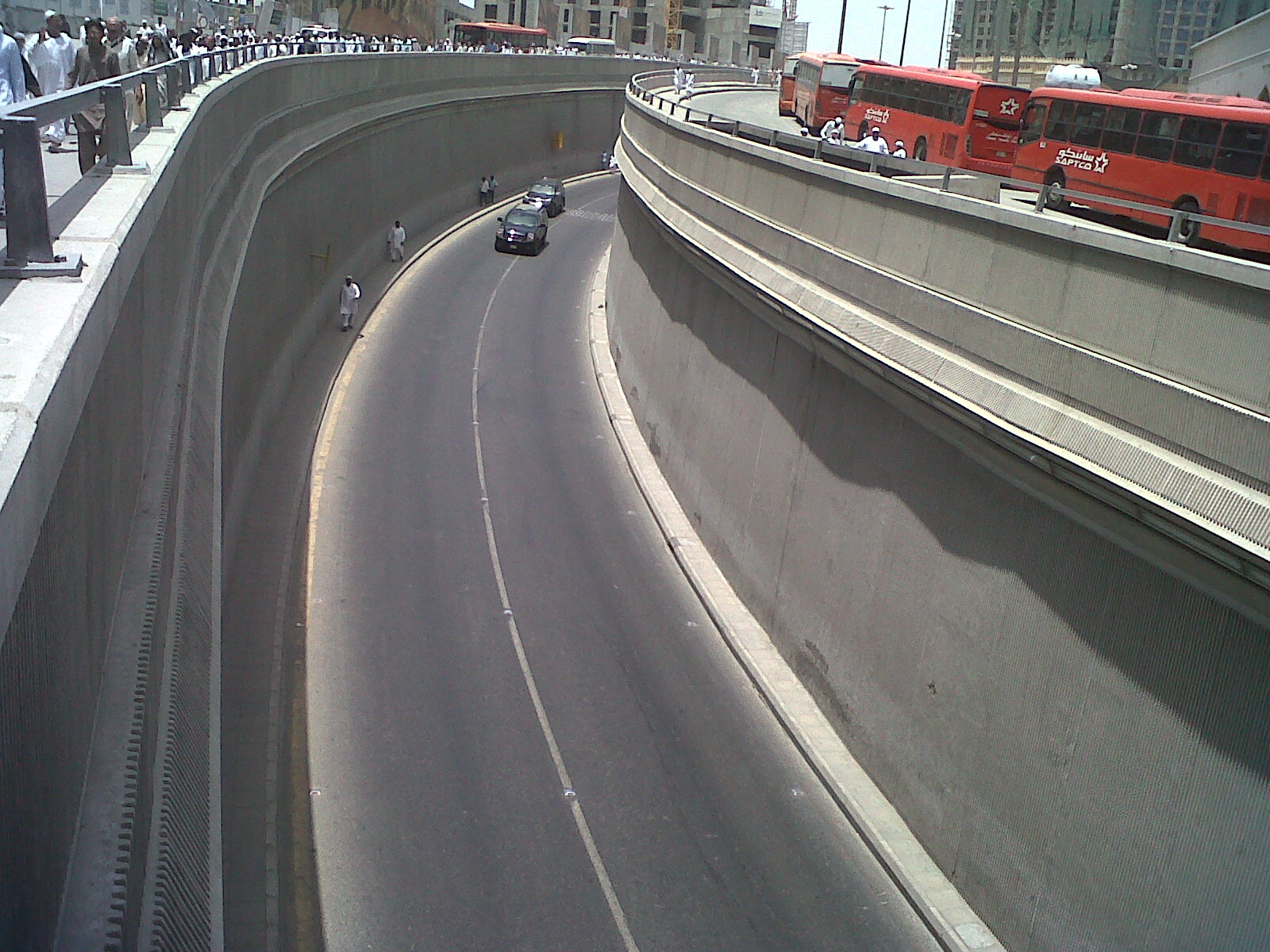 haram road